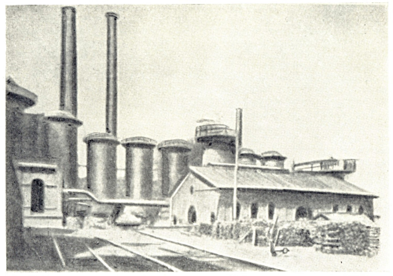 Сулинский Металлургический завод. Старый доменный цех.